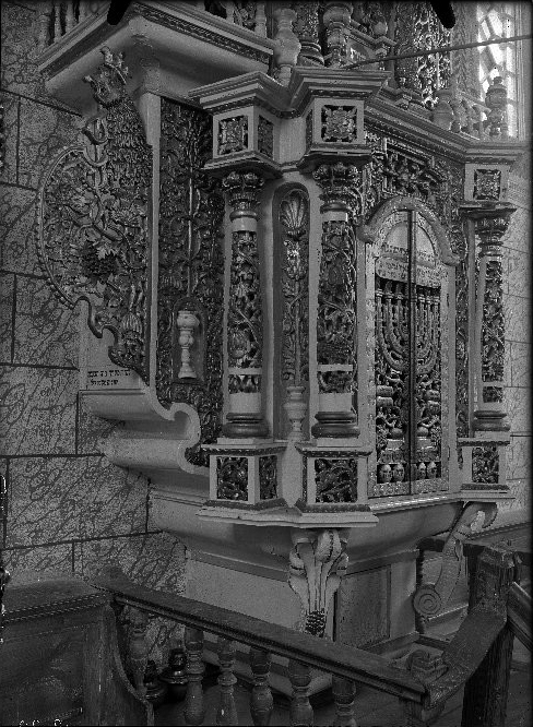 Беларуская (тарашкевіца): Воўпа (Voŭpa). Сынагога